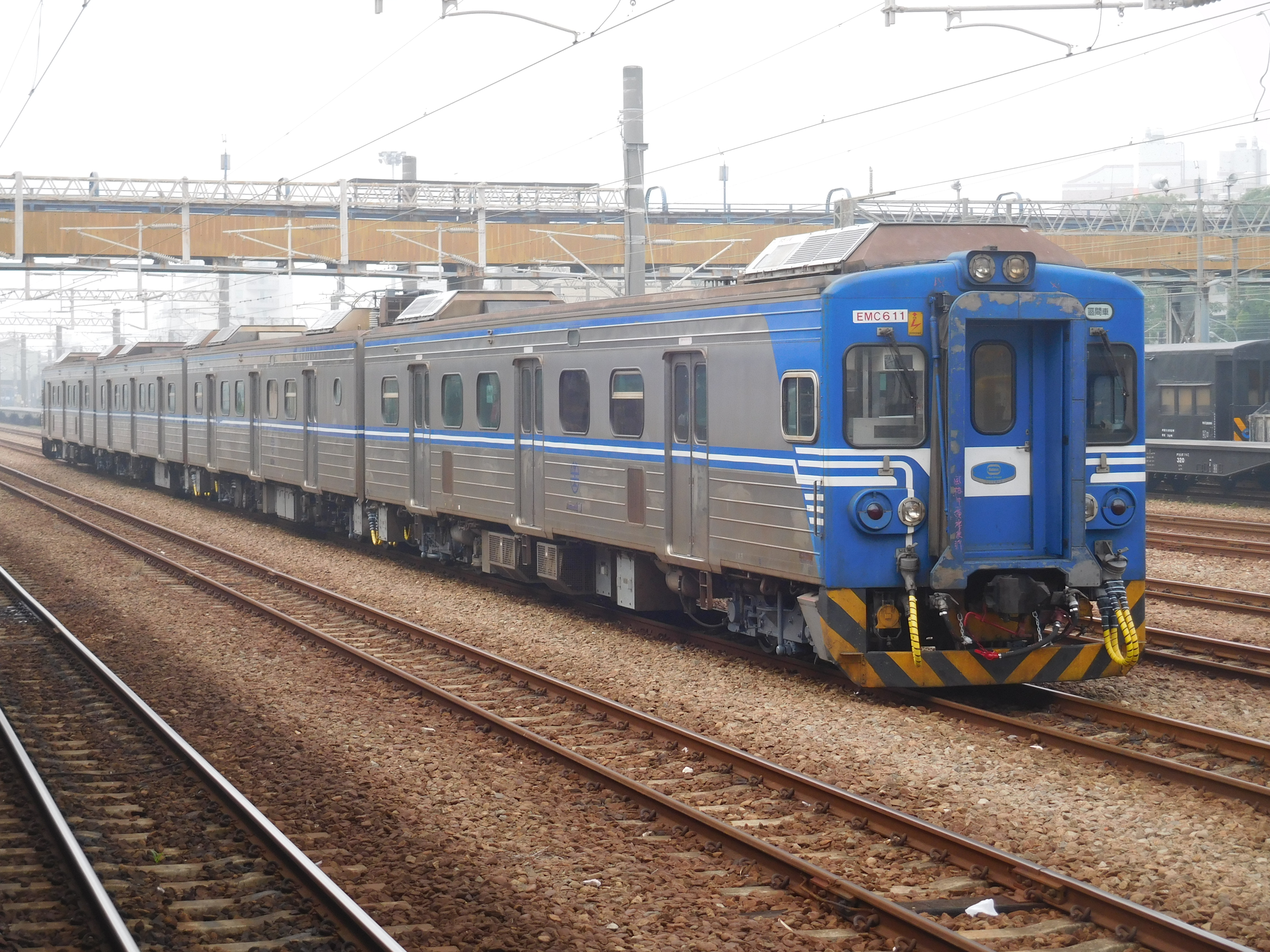 準備進場改造的臺灣鐵路管理局電聯車EMU611於彰化車站。